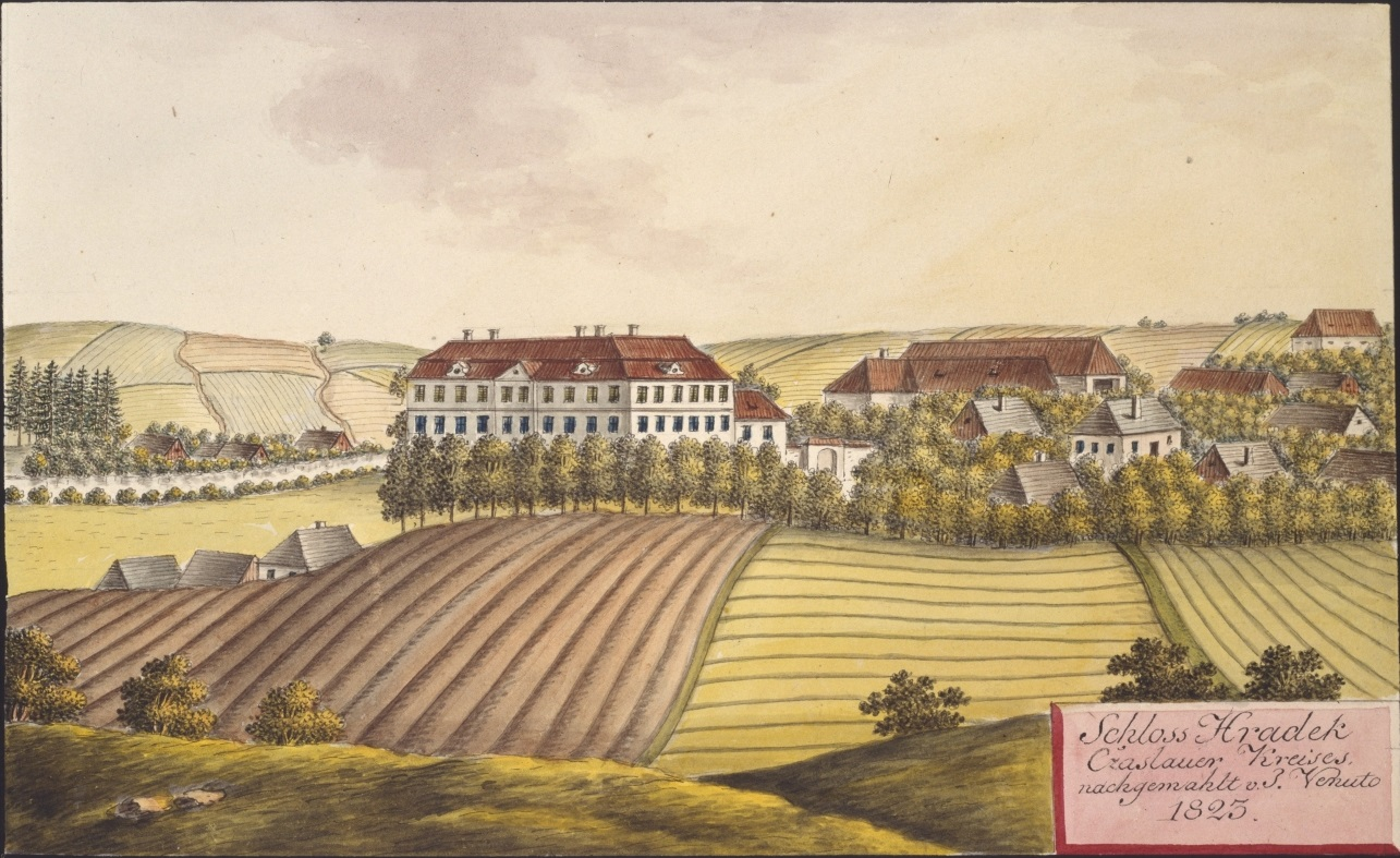 Zámek Hrádek Schloss Hradek, Czaslauer Kreises, nachgemahlt v. J. Venuto 1823